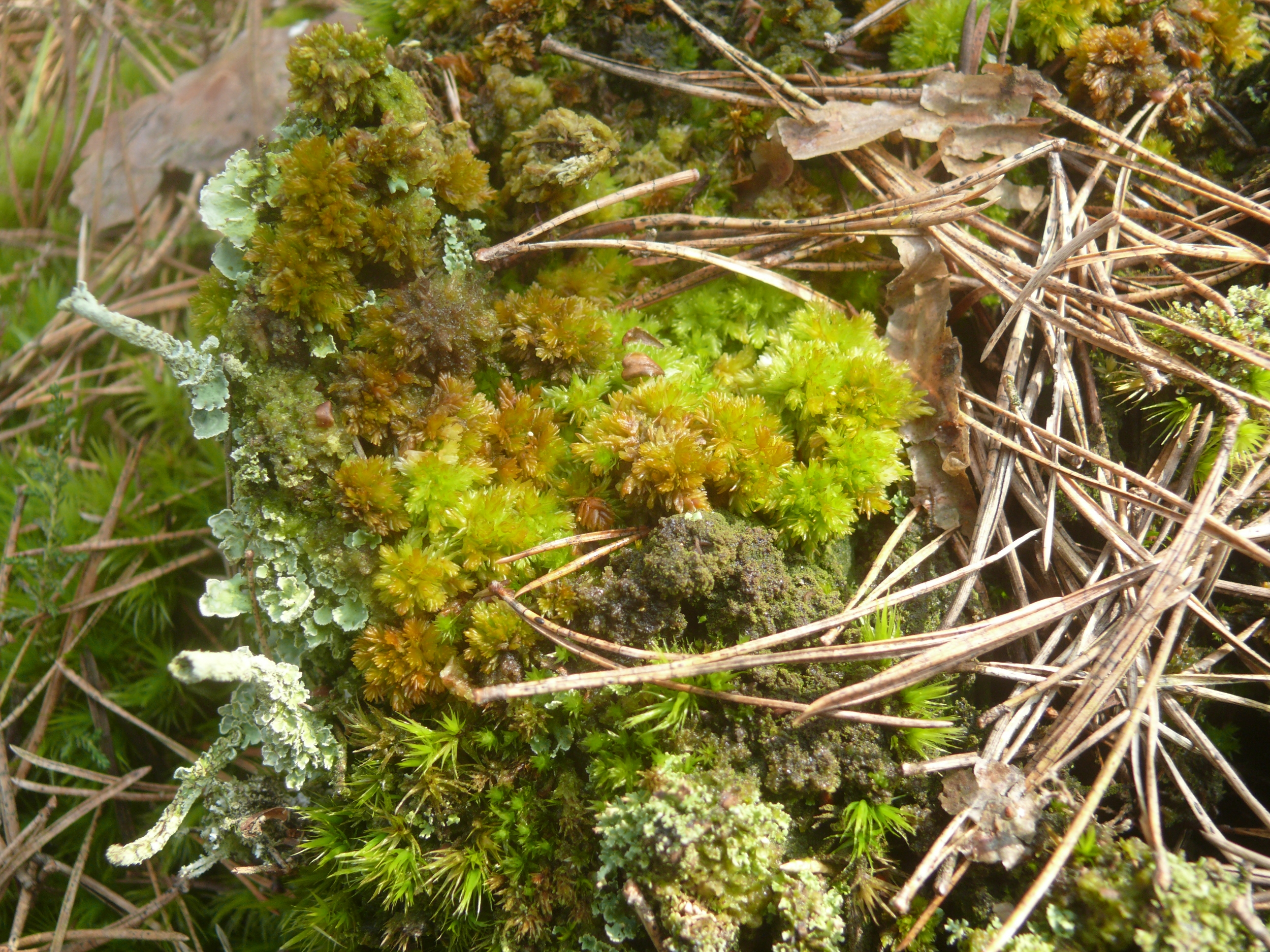 Sphagnum compactum, Rangau, Bayern